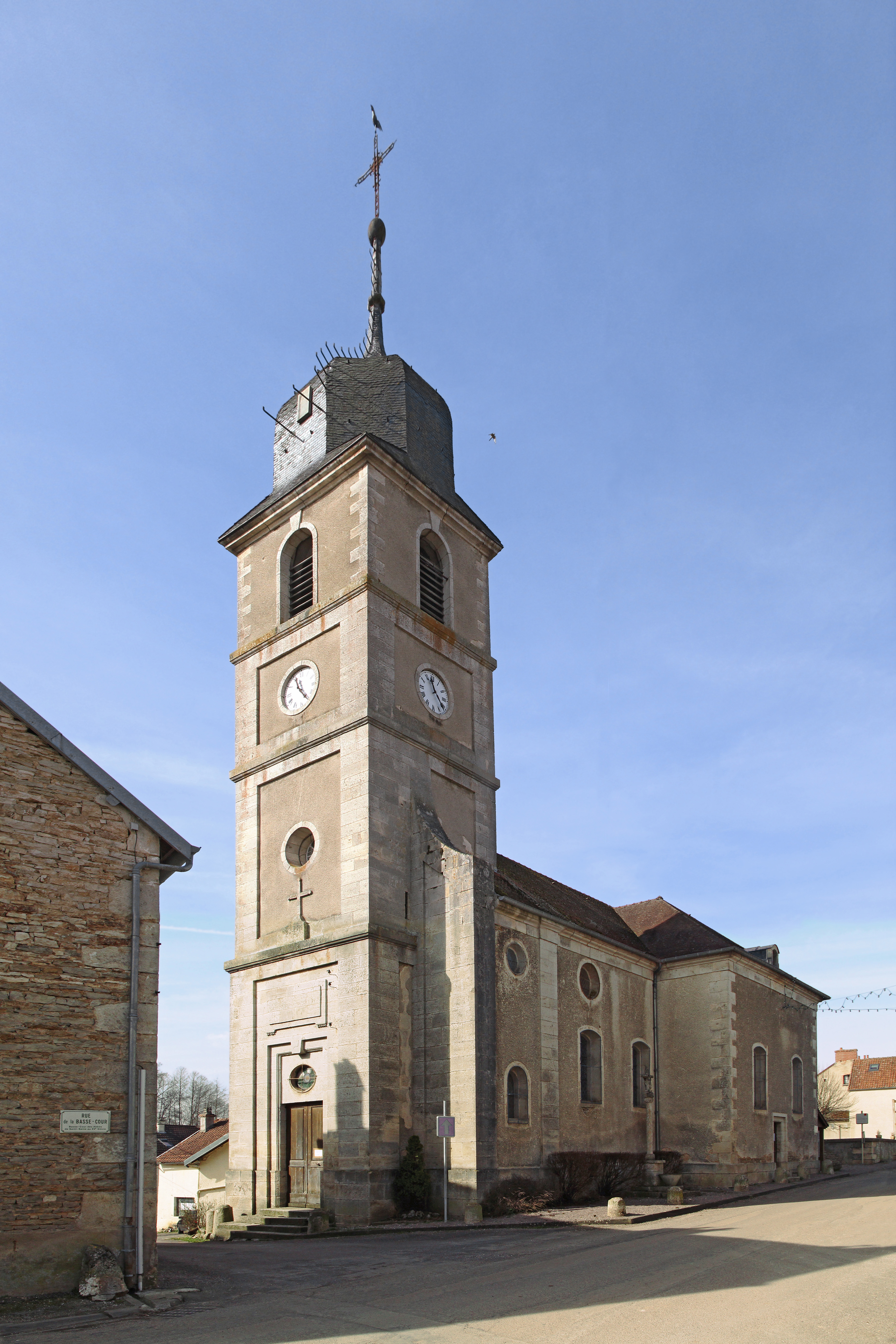 Église de la Nativité de Lamargelle